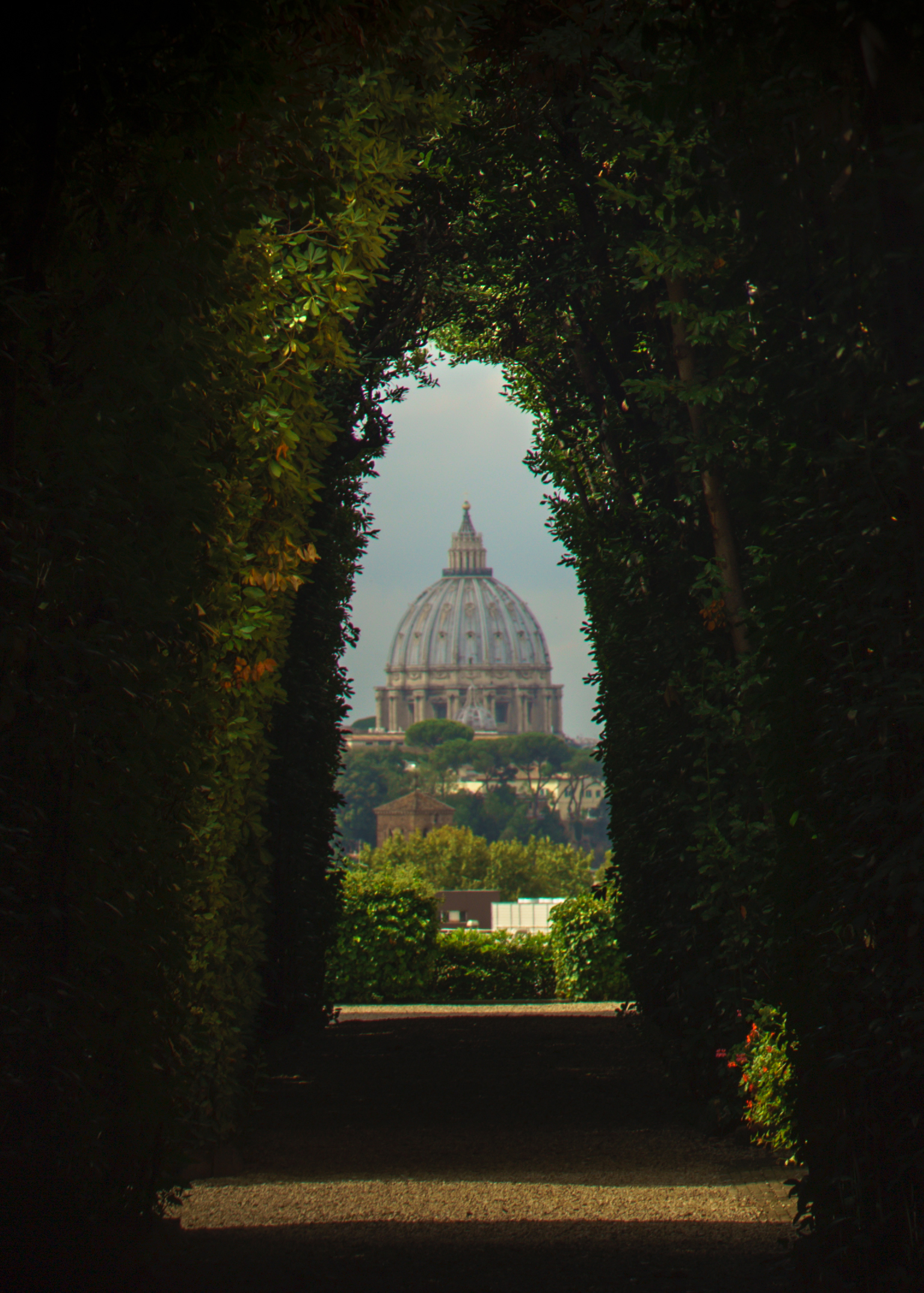 Image at the Wayback Machine (archived on 11 May 2017) Gallery at the Wayback Machine (archived on 5 May 2017) Galen Crout galen_crout